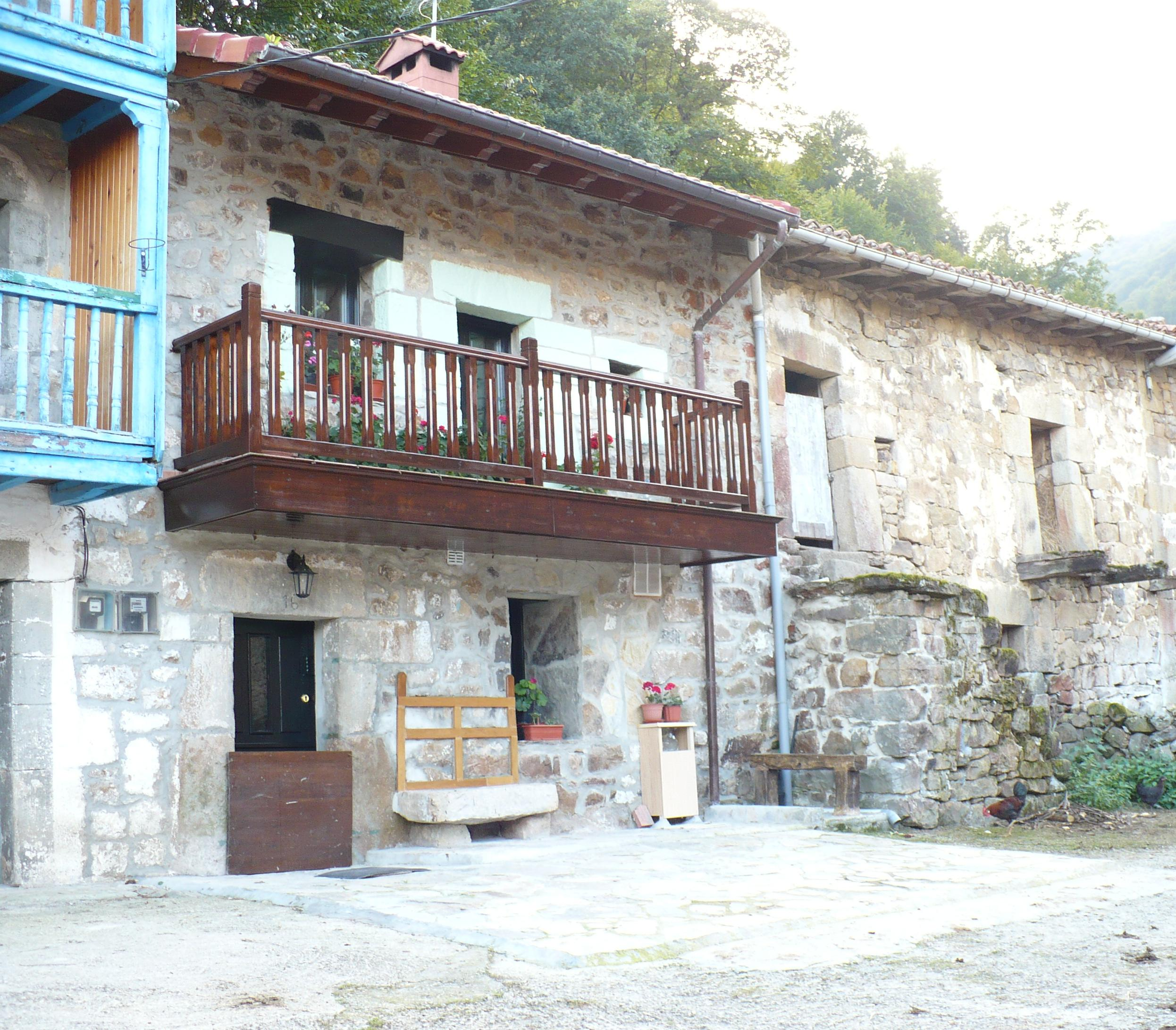 Selviejo (Luena, Cantabria) - casa típica con solana. Selviejo (Luena, Cantabria) - traditional house.